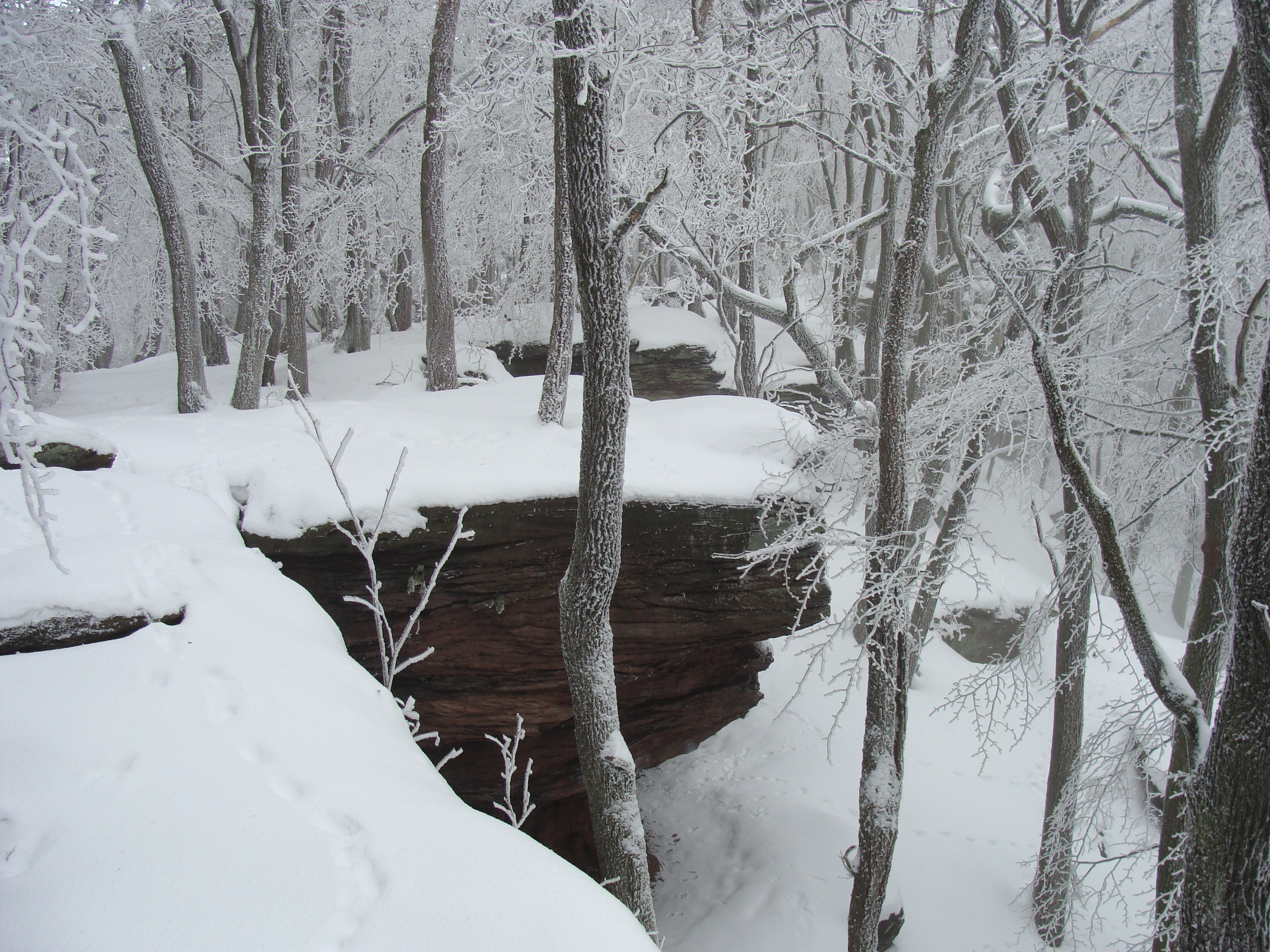 Felsenmeer am Hüttenberg (Kalmitmassiv im Haardt/Pfälzerwald)